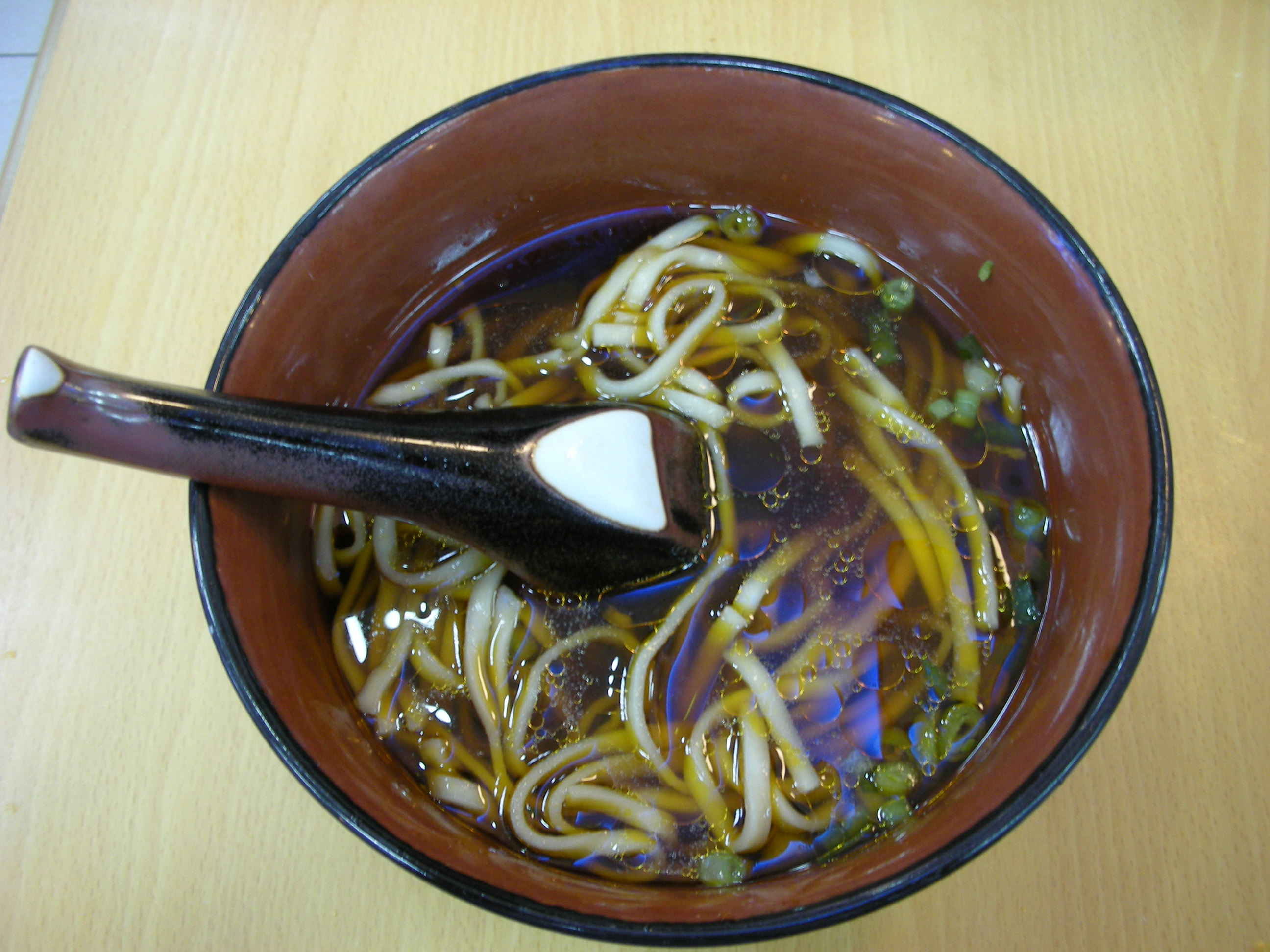 中文（台灣）: 三商巧福峨眉店原汁牛肉麵。